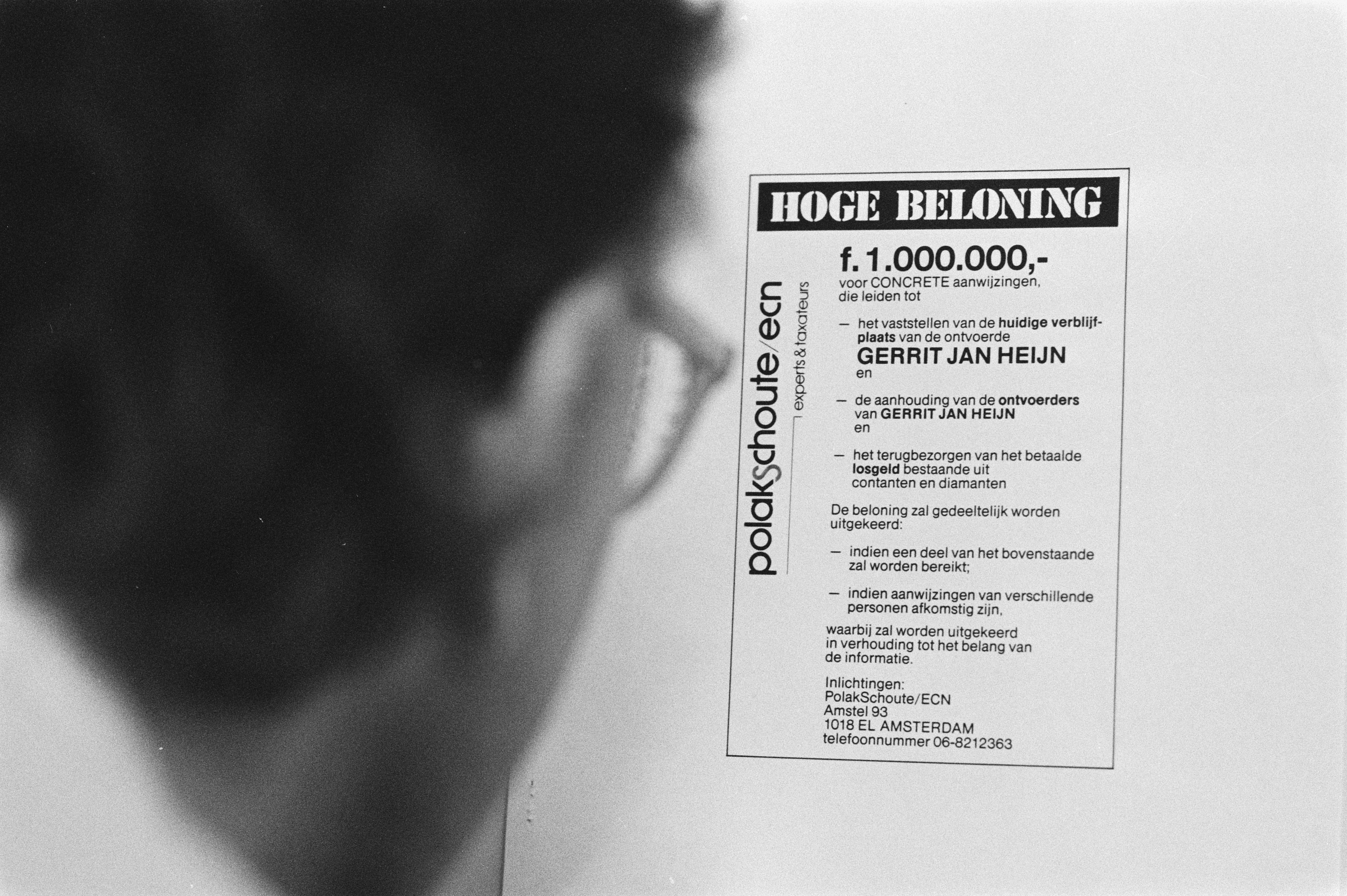 Collectie / Archief : Fotocollectie Anefo Reportage / Serie : [ onbekend ] Beschrijving : Ontvoering Gerrit Jan Heijn ; advertentie met een hoge beloning van 1 miljoen gulden voor tips Datum : 29 december 1987 Trefwoorden : advertenties, ontvoeringen Fotograaf : Croes, Rob C. / Anefo Auteursrechthebbende : Nationaal Archief Materiaalsoort : Negatief (zwart/wit) Nummer archiefinventaris : bekijk toegang 2.24.01.05 Bestanddeelnummer : 934-1593